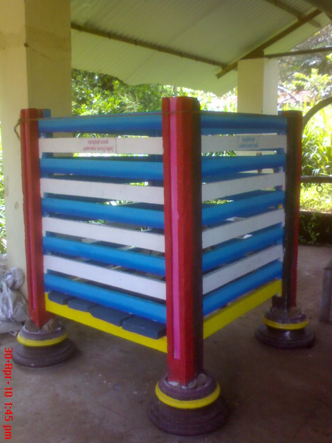 ഫെറോസിമെന്റ് ബിന്നുകൾക്ക് ഒട്ടേറെ ഗുണങ്ങൾ ഉണ്ട്..